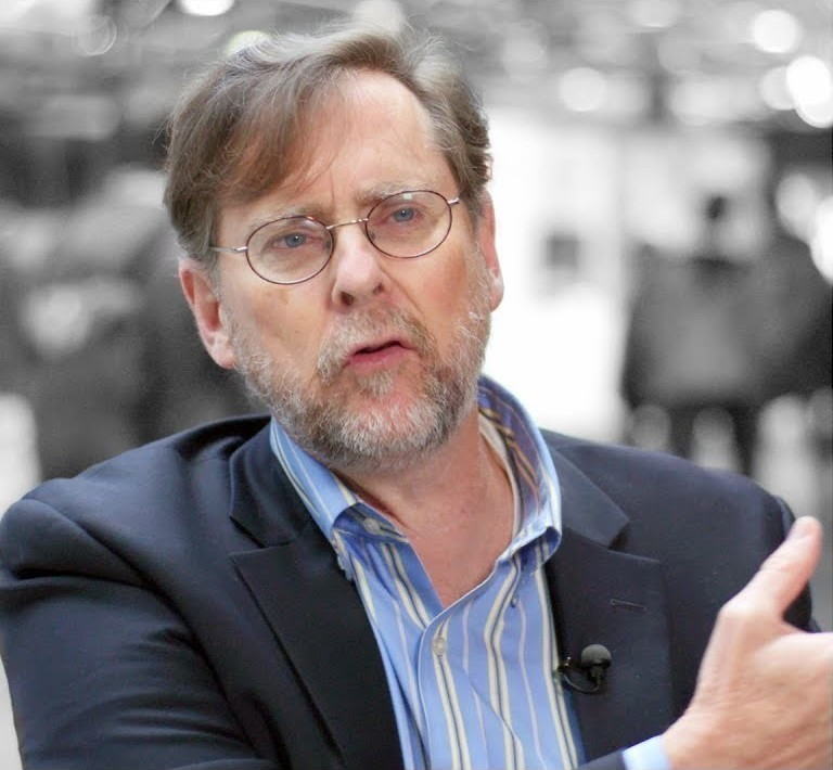 More freedom, more flexibility? The advantages of the job market for IT experts sound great. But there are also the downsides for the new digital workforce, ...